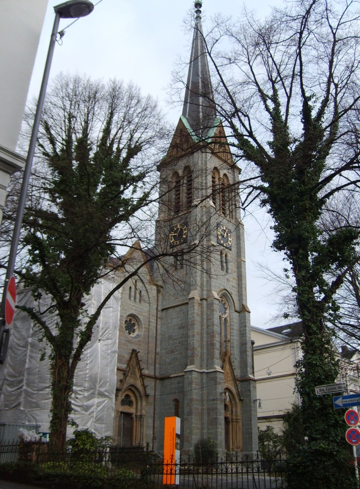 Wuppertal, Immanuelskirche, außen